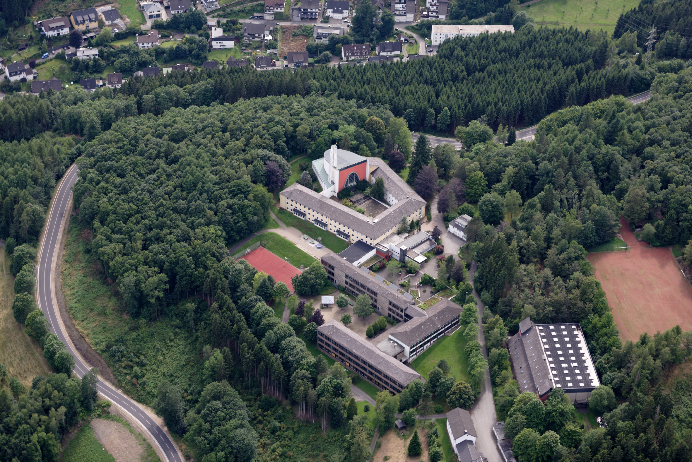 Fotoflug Sauerland West. Luftaufnahme: Kloster und Gymnasium Maria Königin, Altenhundem, Nordrhein-Westfalen.